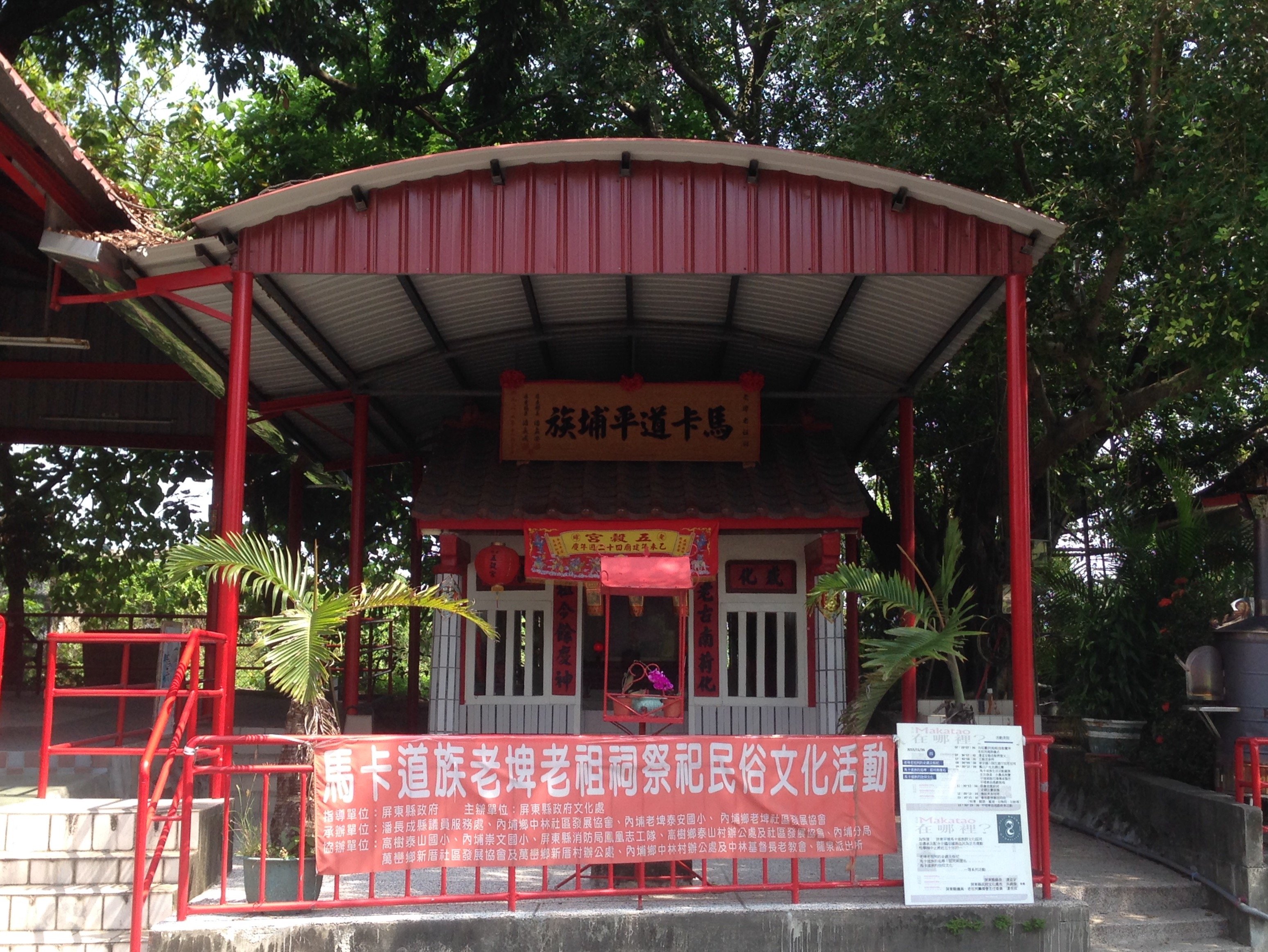 老埤老祖祠遠觀